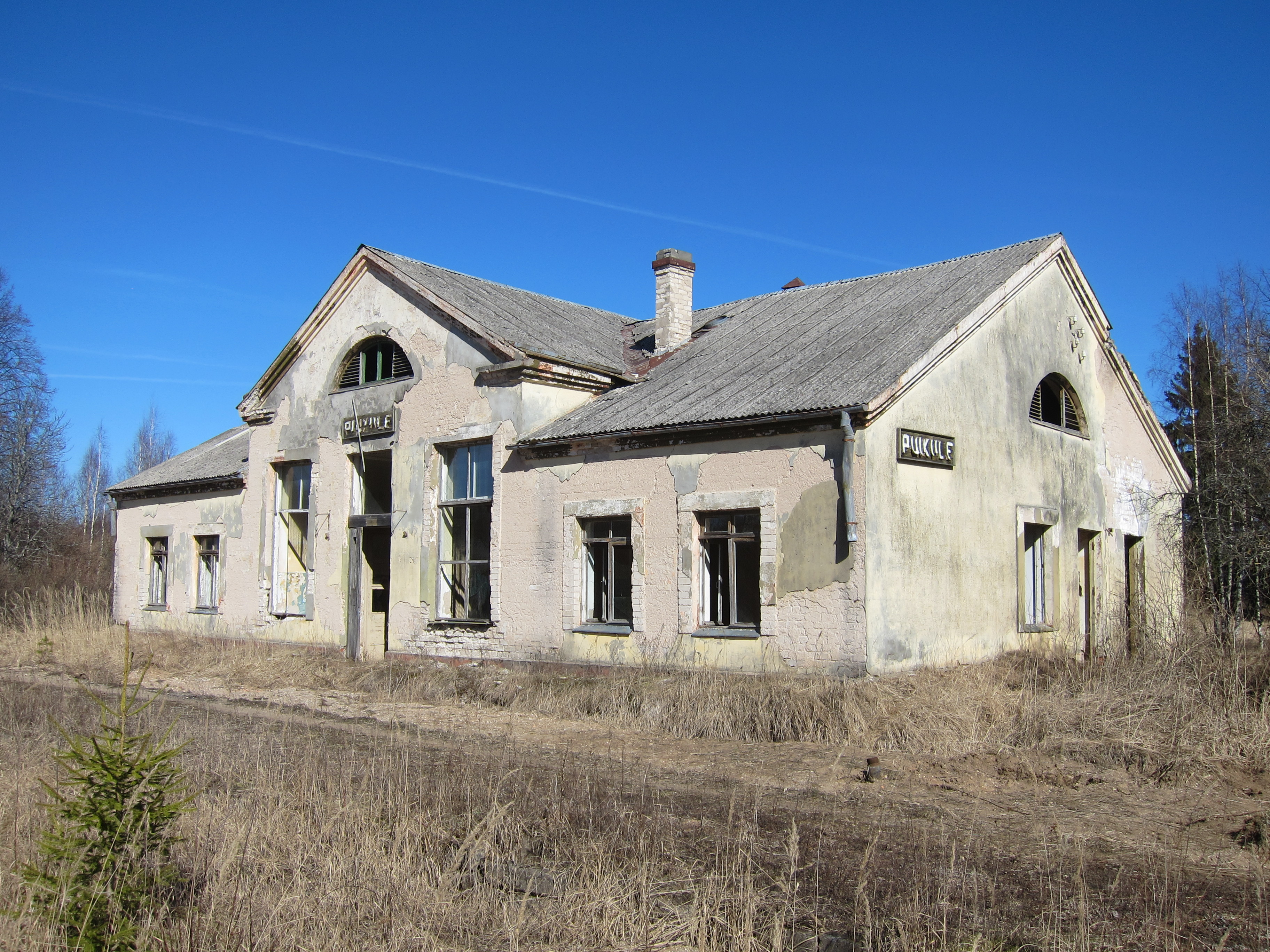 Puikules stacijas ēka